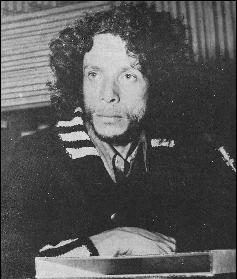 Jorge Pinchevsky, músico argentino